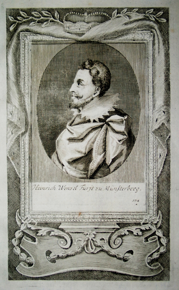 Heinrich Wenzel von Oels und Bernstadt (1592 - 1639 ): Heinrich Wenzel Fürst zu Münsterberg 1617–1639 Herzog von Bernstadt. Zudem führte er den Herzogstitel von Münsterberg sowie den Titel eines Grafen von Glatz. Von 1629 bis 1639 war er Landeshauptmann von Schlesien.